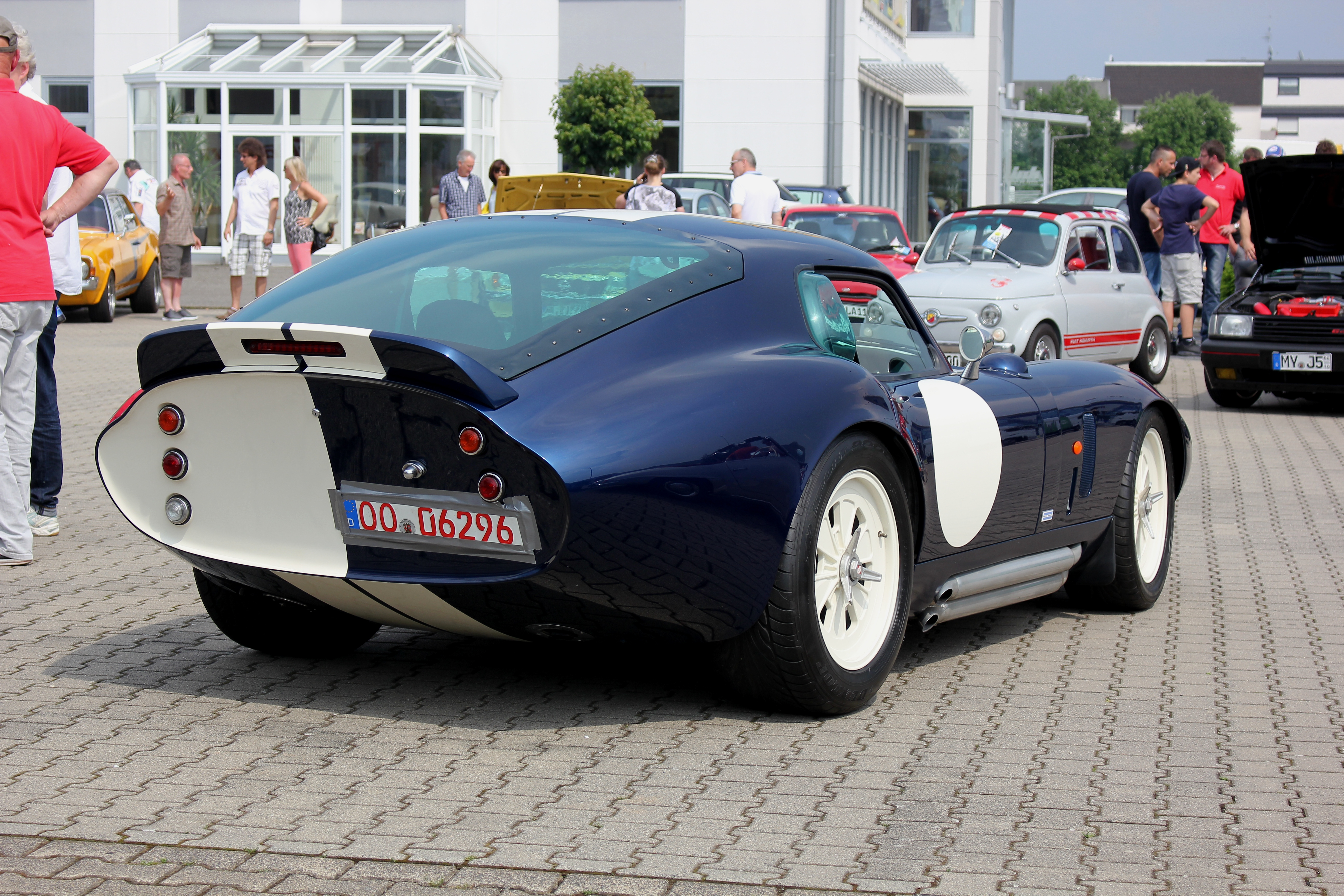 Shelby Cobra Daytona Coupe CSX9000 - Replica von Superformance (fiktives Kennzeichen)